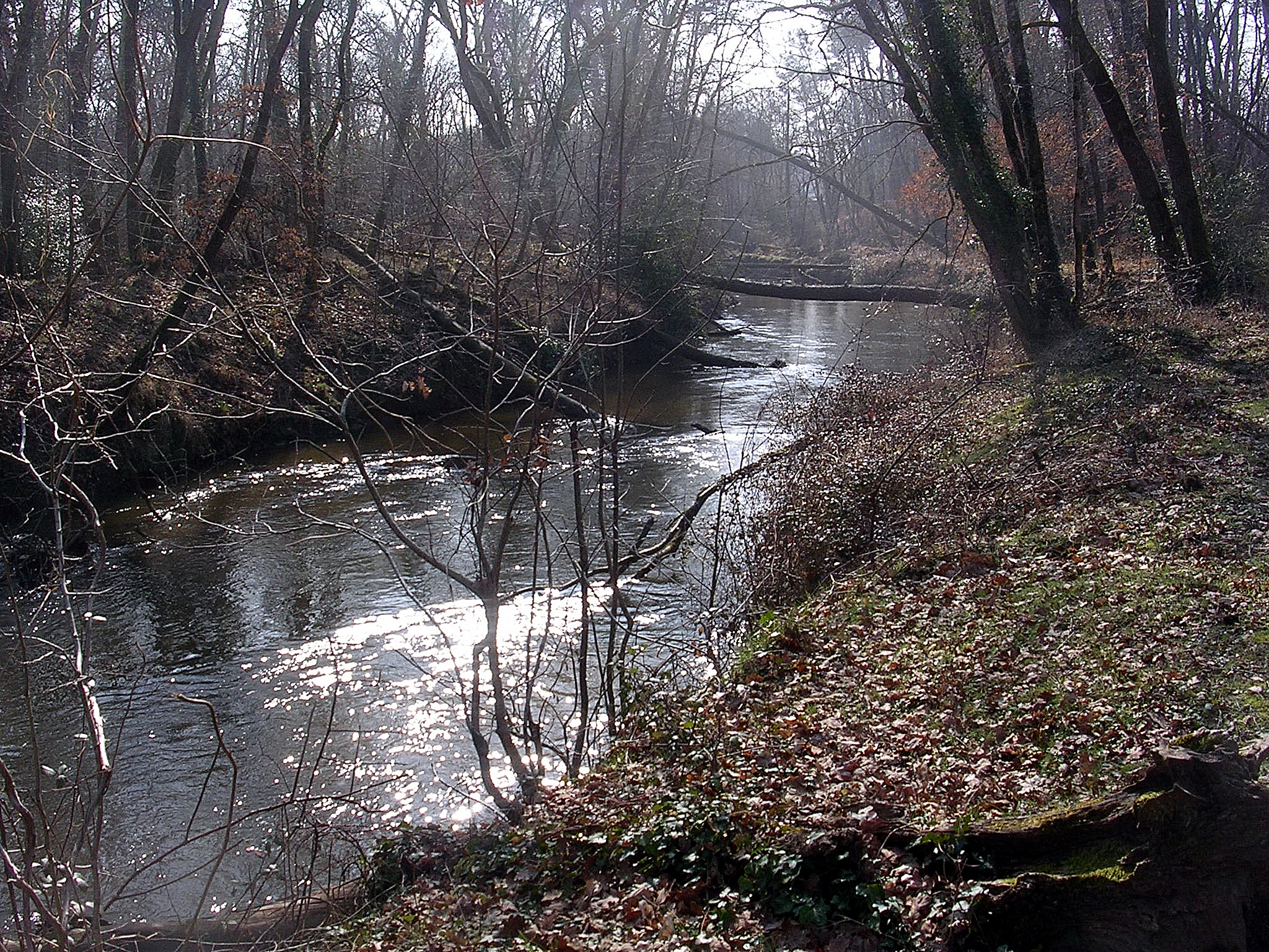 La Petite Leyre à Moustey, dans le département français des Landes